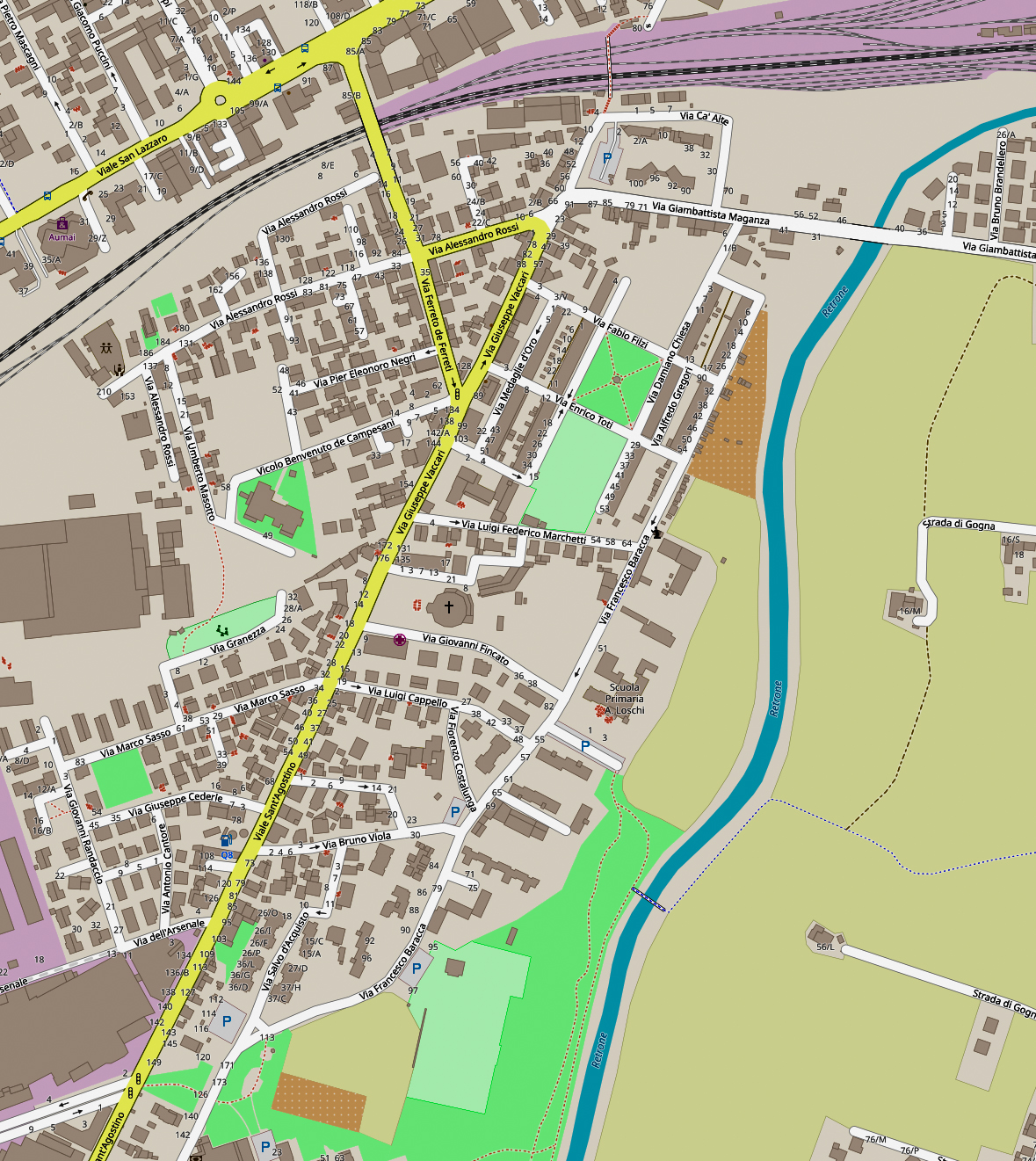 Mappa del Quartiere Ferrovieri